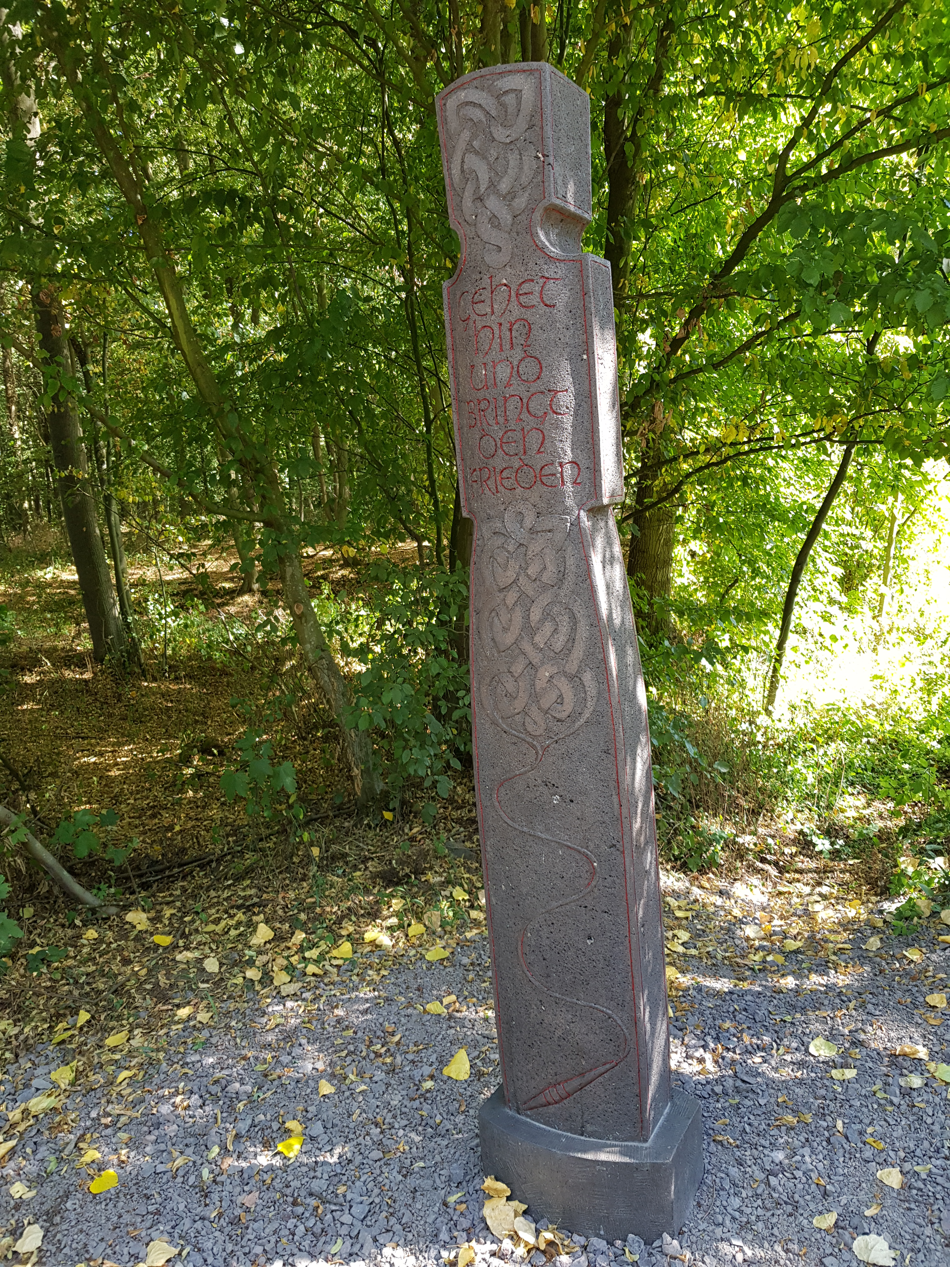 Die Stele erinnert an Lüfthildis Friedensstiftung